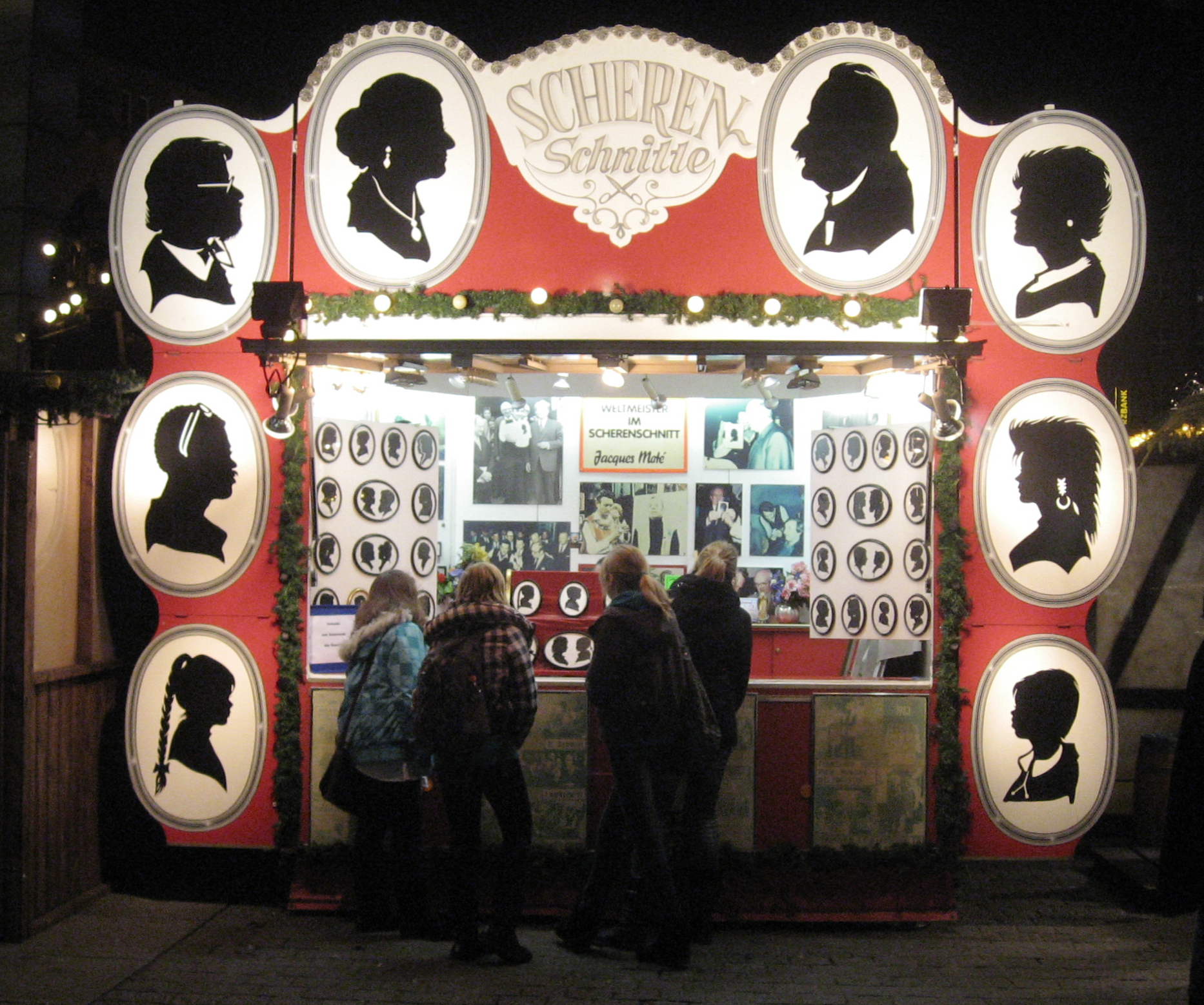 Dortmund Weihnachtsmarkt 2010 Stand des Scherenschneiders Jacques Maté (bürgerlich Matéos), Düsseldorf. Weltmeister als schnellster Scherenschnittkünstler (Guinness-Buch der Rekorde 1982). Er trat in den 1980er Jahren in vielen Fernsehshows auf und hatte prominente Modelle wie Brandt und Kohl.